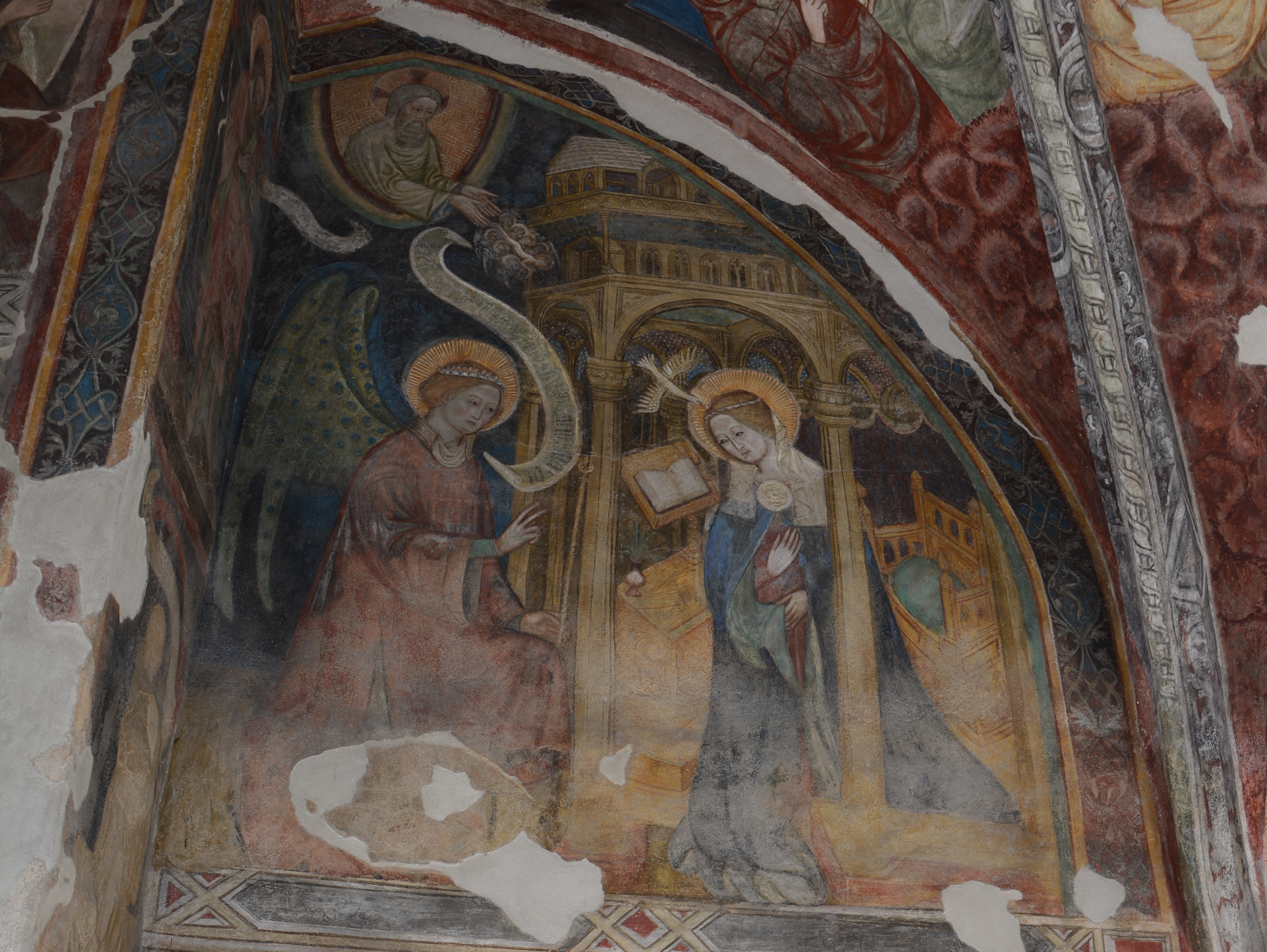 Fresko im Kreuzgang des Brixner Domes, Nordwand der 10. Arkade: Verkündigung und Menschwerdung Christi eines unbekannter italienischen Meistes. Interessant die Darstellung der Seele Christi, die von Engeln vom Himmel herabgetragen wird.